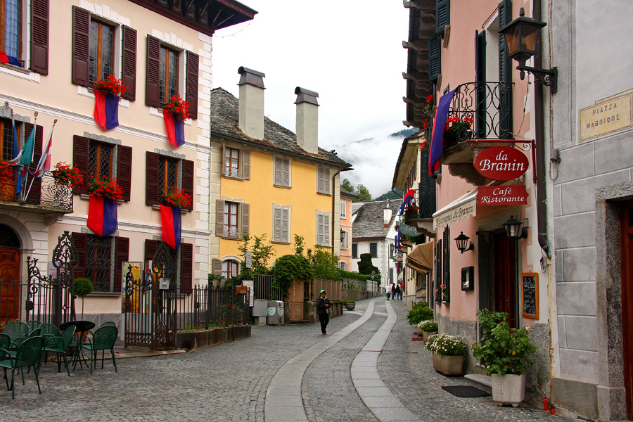 Scorcio del centro di Santa Maria Maggiore (VB), sulla sinistra il palazzo municipale